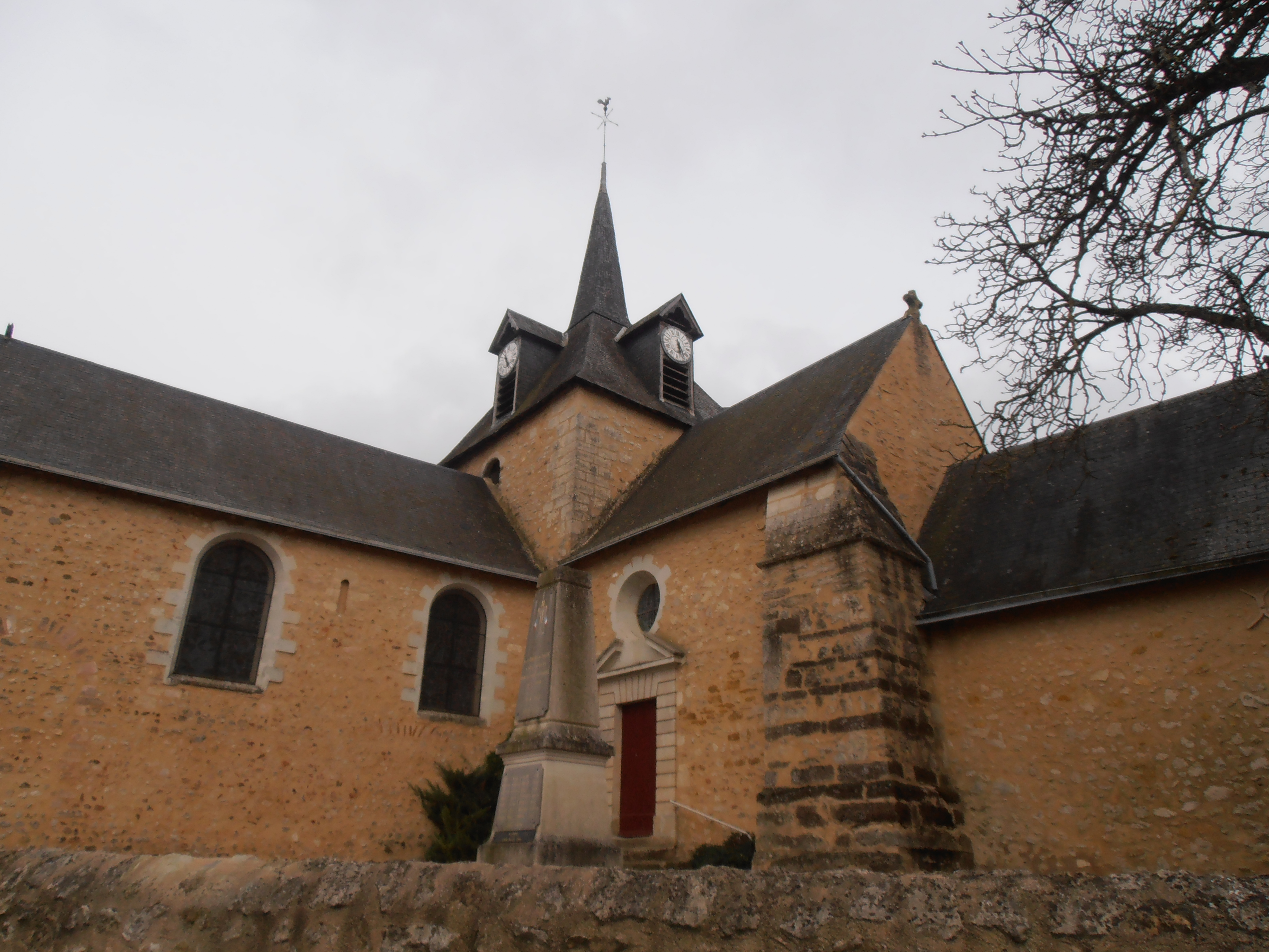 L'église de Tassé